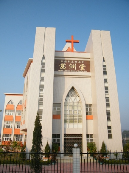 基督教葛洲堂